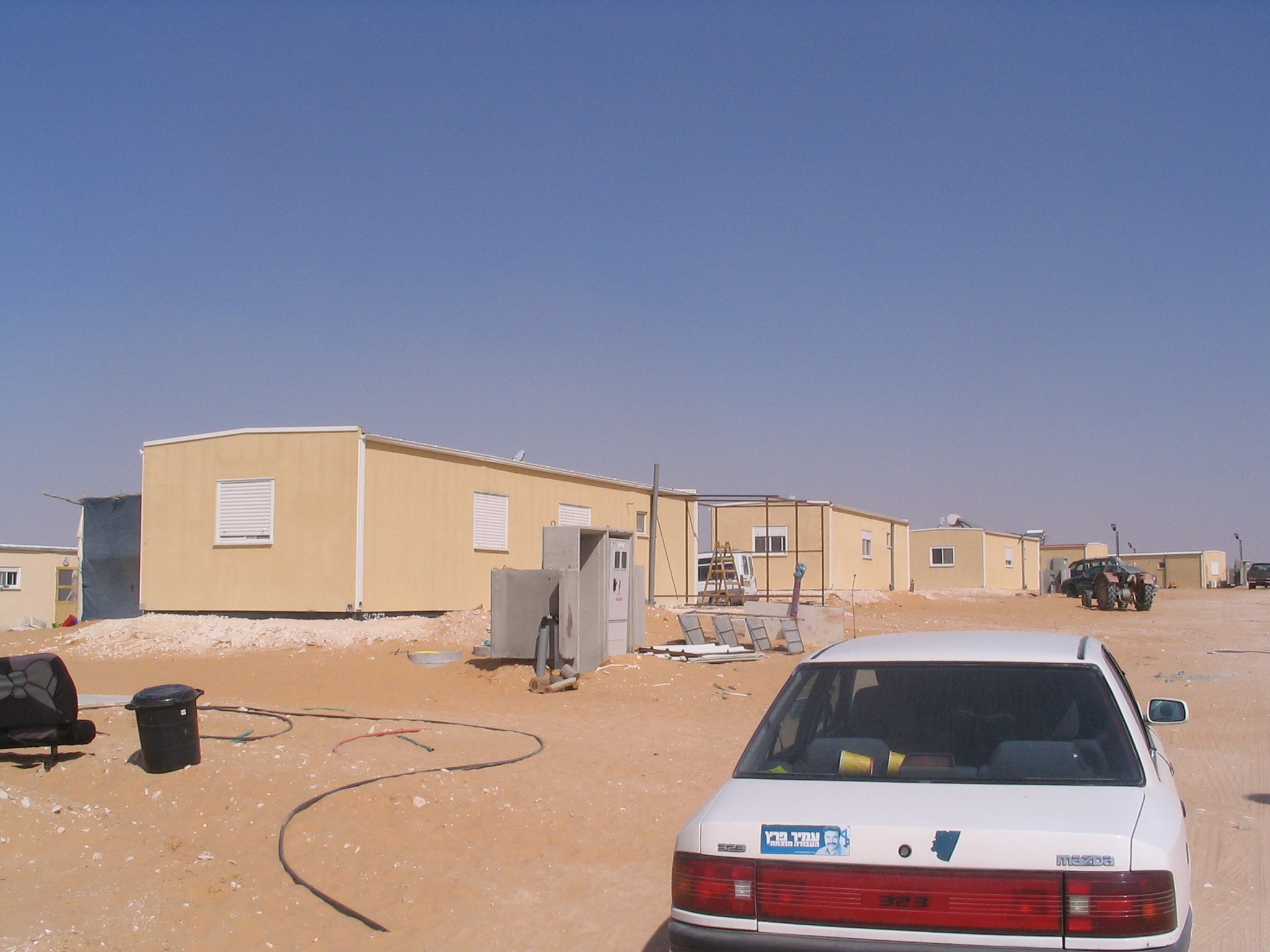 המושב באר מילכה